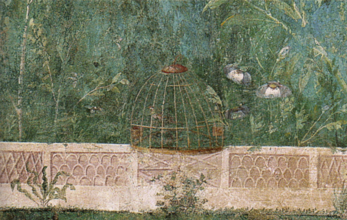 Villa di livia, affreschi di giardino, parete corta meridionale 03